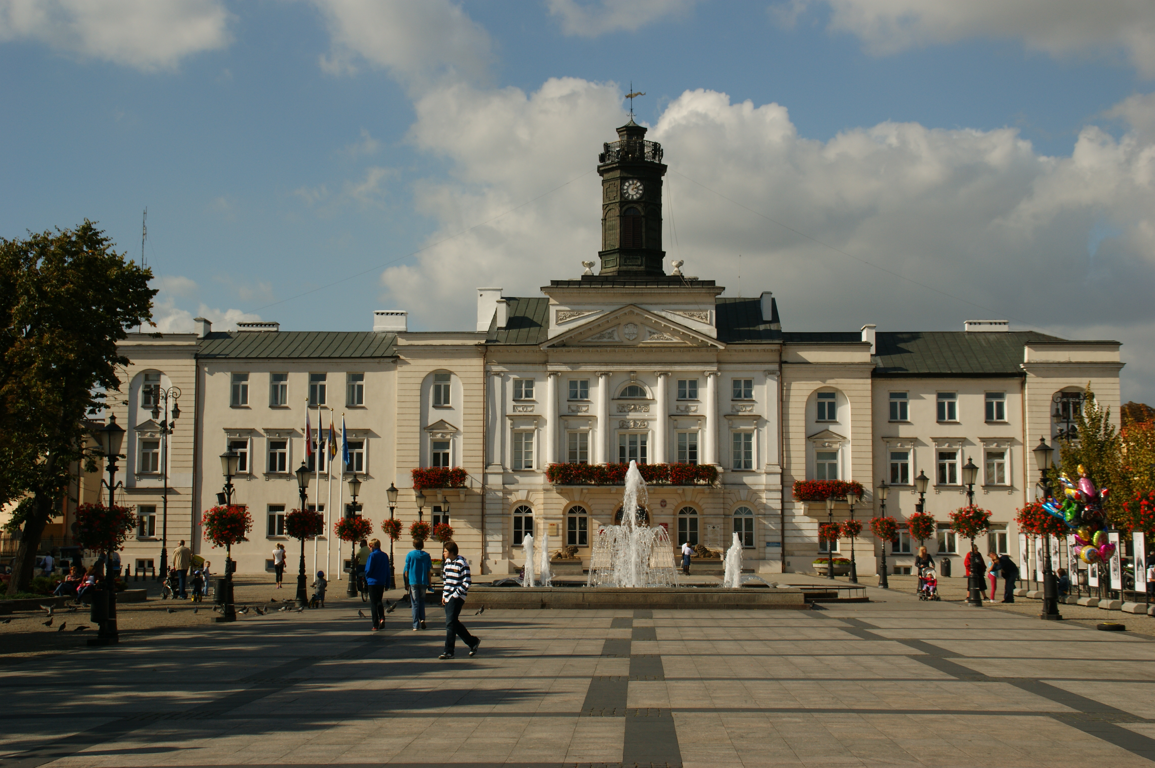 Płock Stary Rynek - XIX-wieczny ratusz